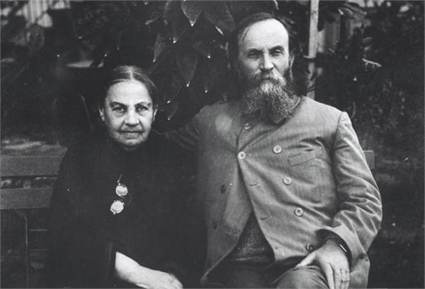 יהושוע חנקין ורעייתו אולגה